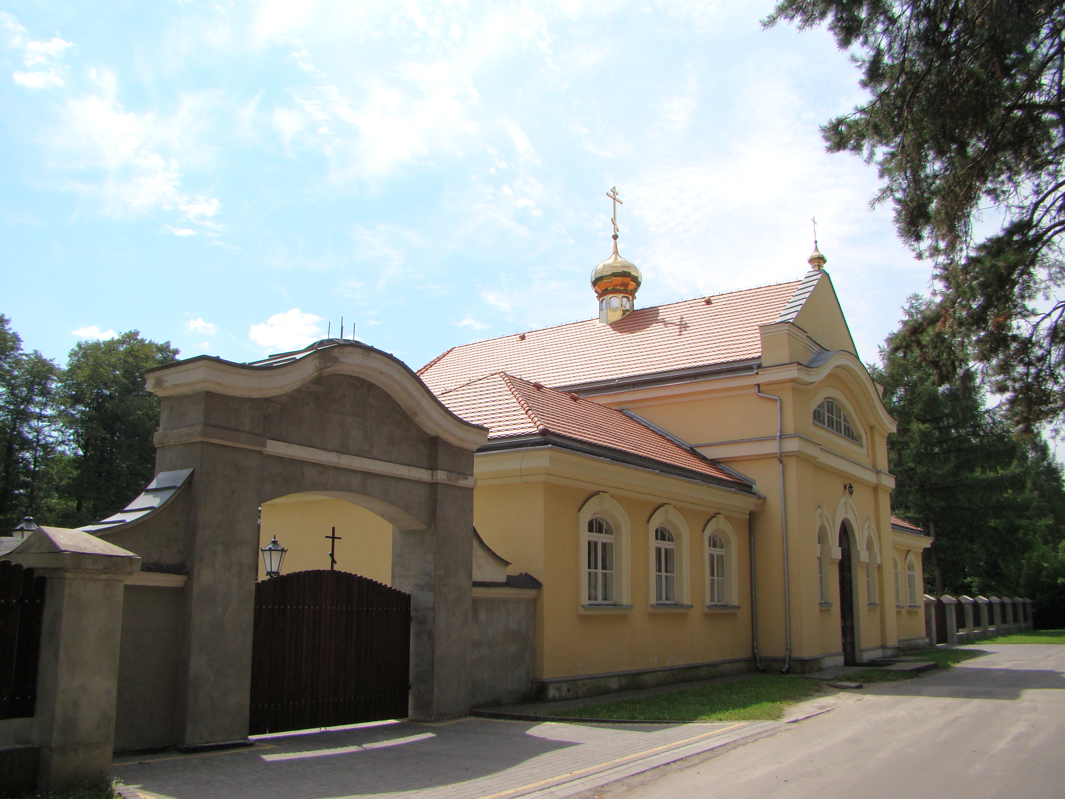 Будівля православного монастиря Покрови Пресвятої Богородиці